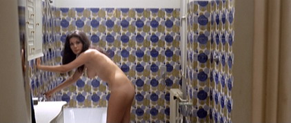 Screenshot dal film Lo strano vizio della signora Wardh.